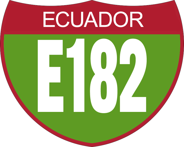 Disco de Identificación Ruta E182